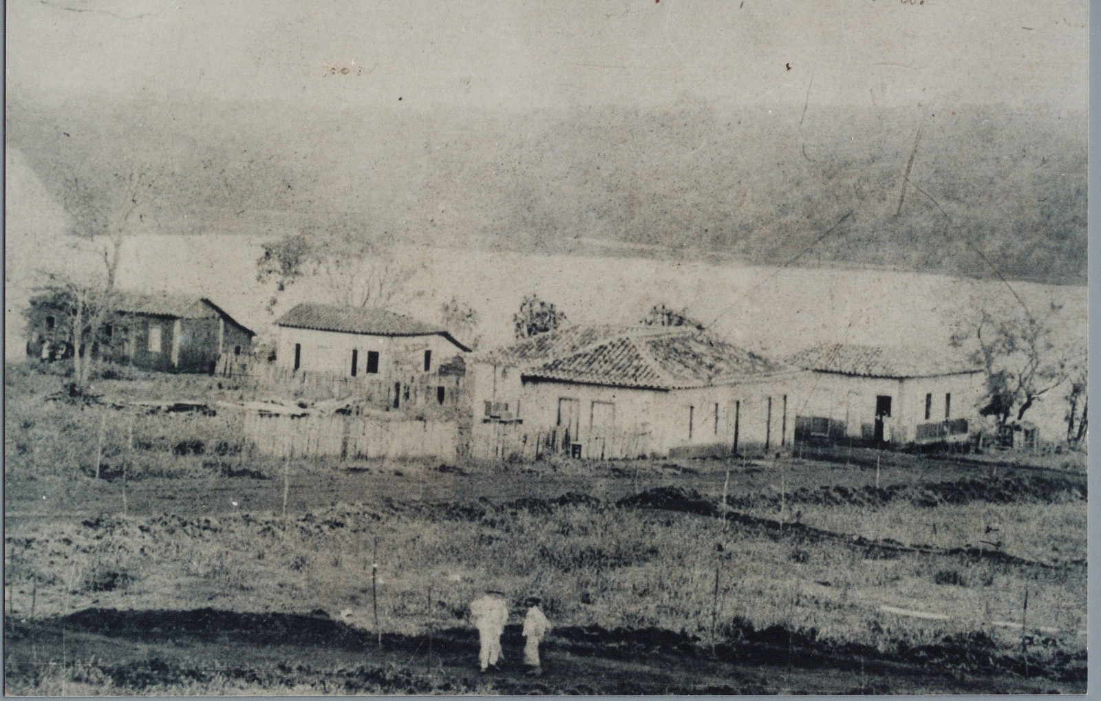 Antiga foto da Rua Pe. Diogo Feijó, tirada em 1887, em Salto Grande, SP.